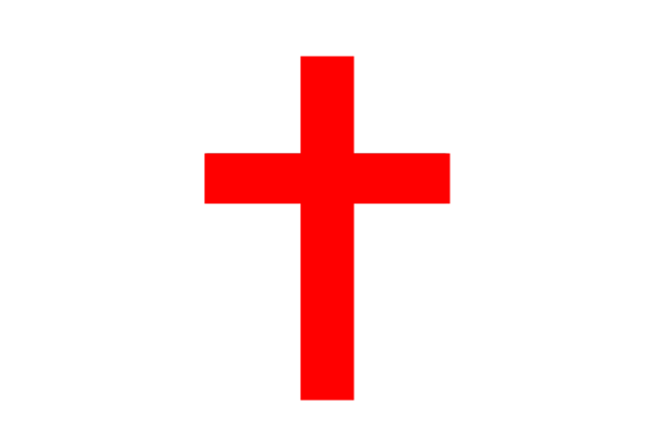 ธงศาสนาคริสต์ที่ใช้ในประเทศไทย ตามกรมการศาสนา กระทรวงวัฒนธรรม